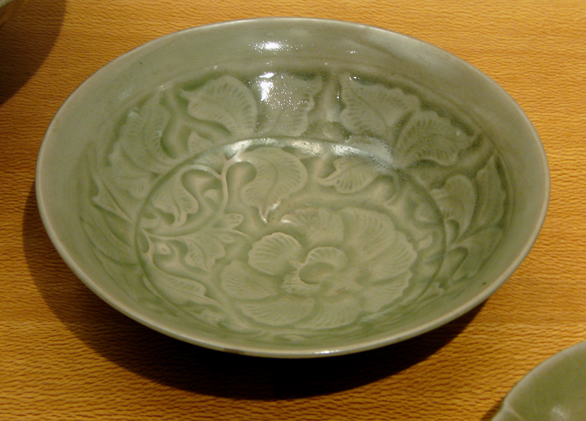 Coupe, grès de type céladon, décor incisé et moulé. Chine du Nord, Shaanxi, Yaozhou, Dynastie des Song du Nord, 10ème-11ème siècle. Musée Guimet, Paris.